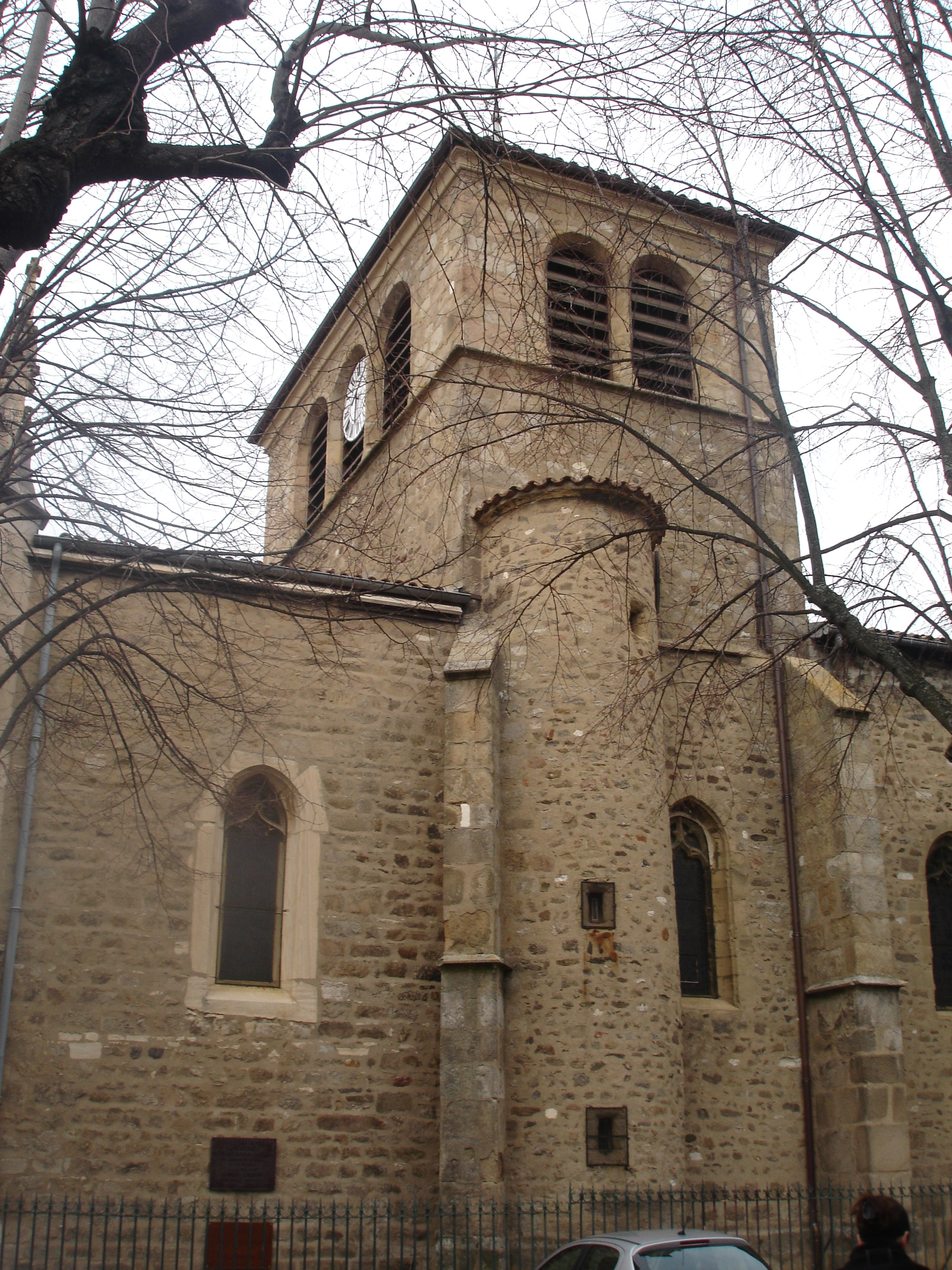 Millery (Rhône) : L'église, vue latérale